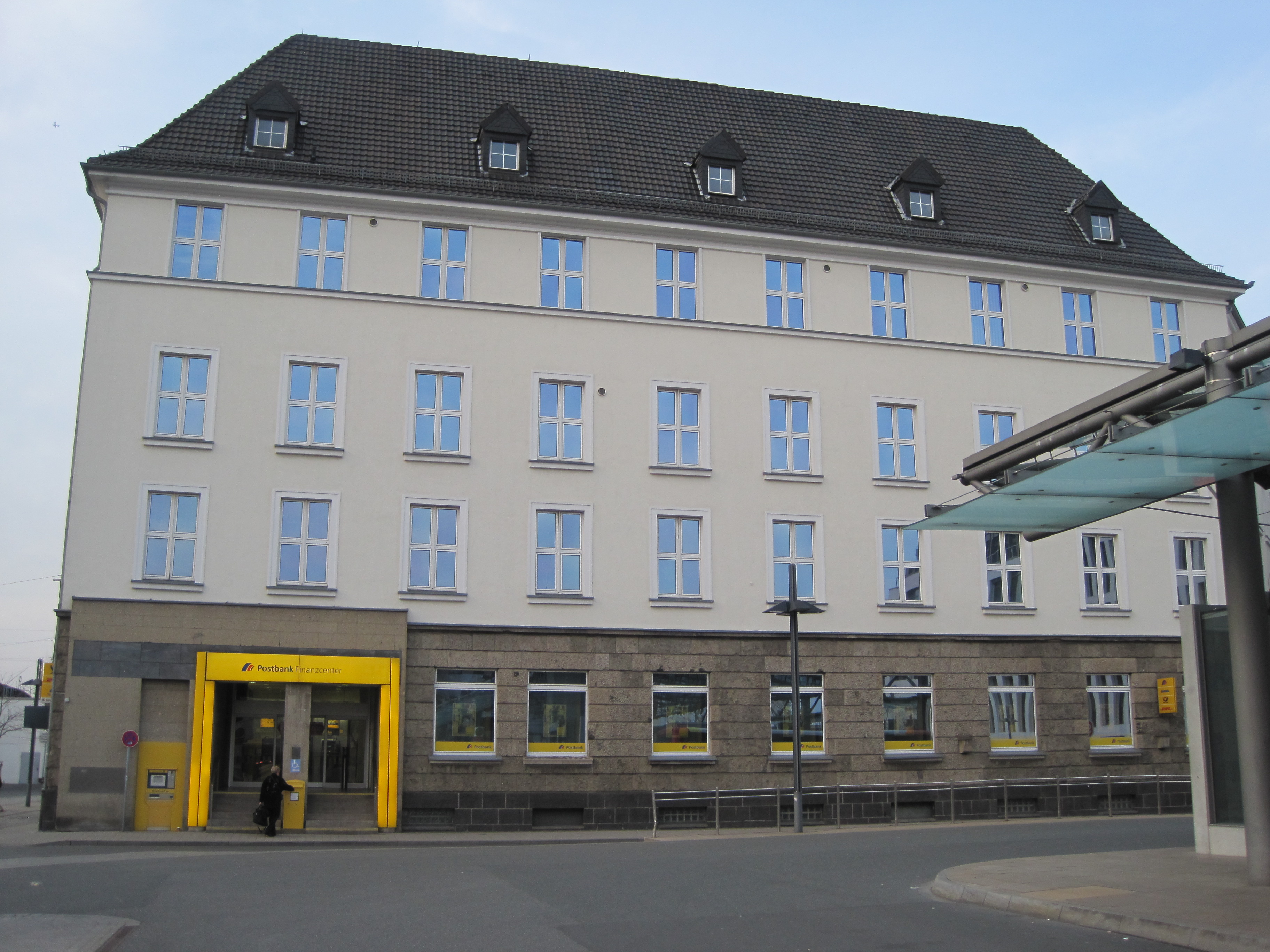 Das Foto zeigt die Hauptpost/Postbank neben dem Technischen Rathaus Hamm.